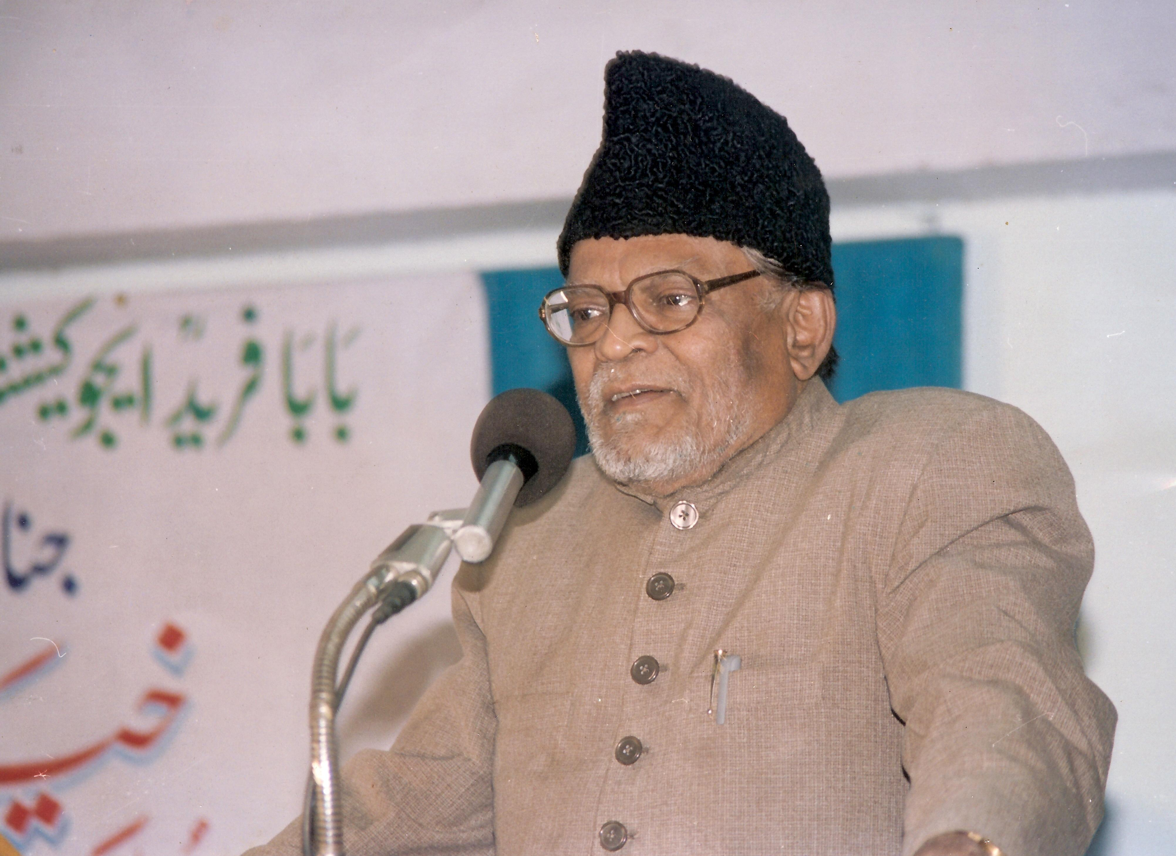 Professor Nisar Ahmed Faruqi